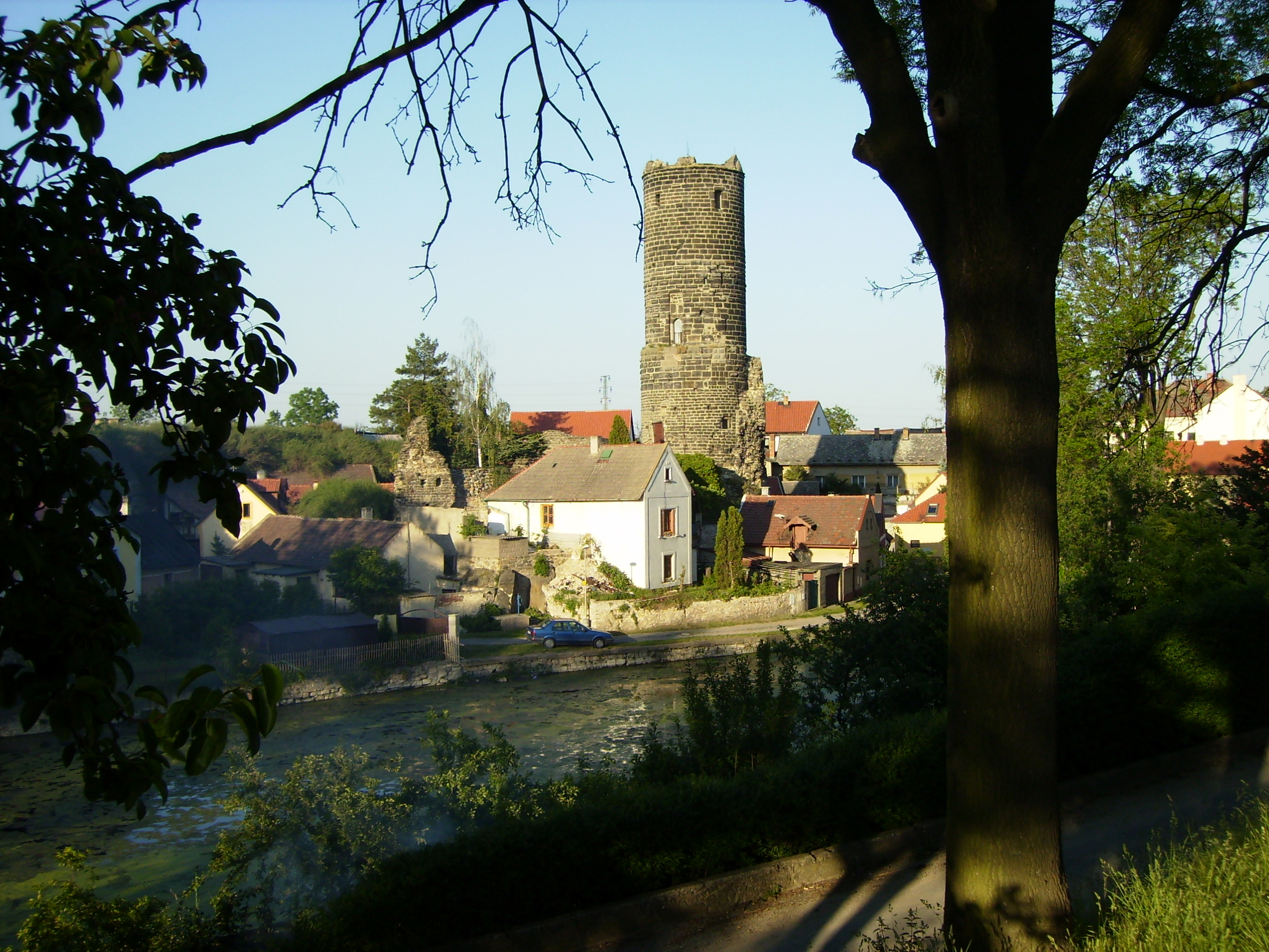 Hrad v Jenštejnu.